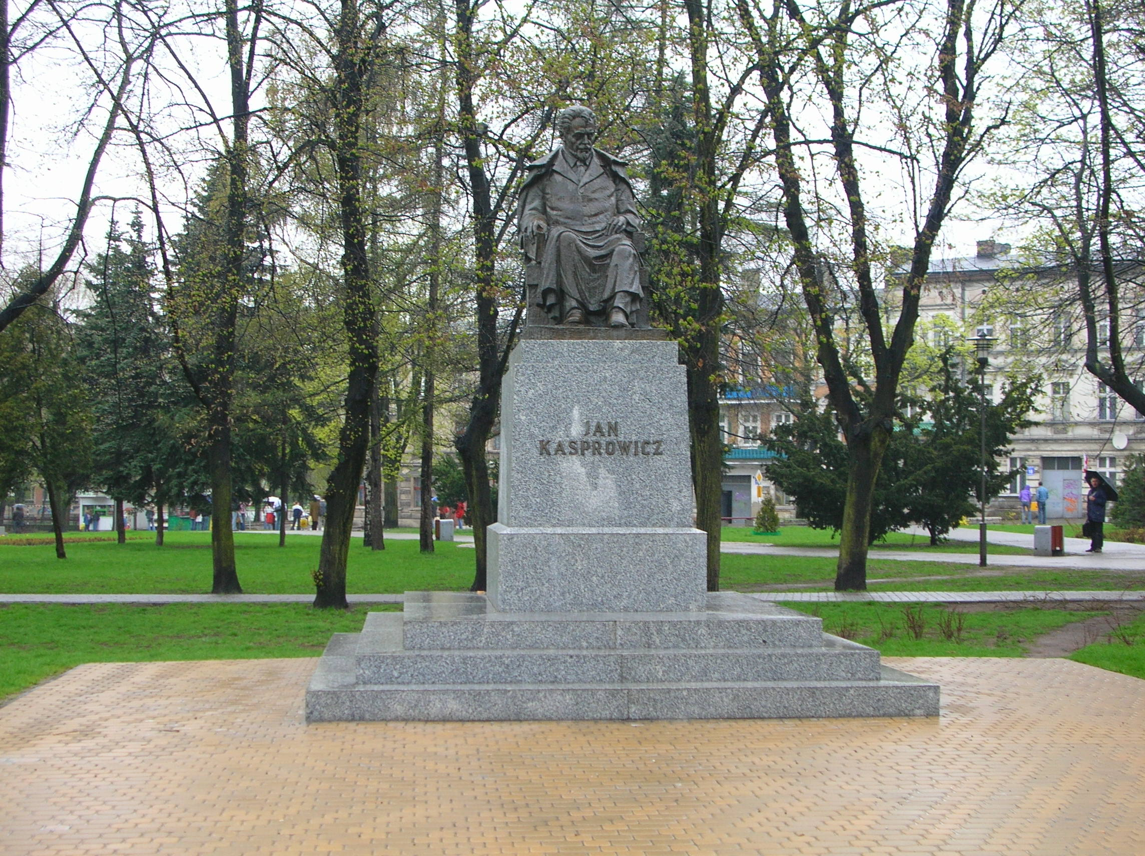 Inowrocław - Pomnik Jana Kasprowicza na ul.Solankowej.